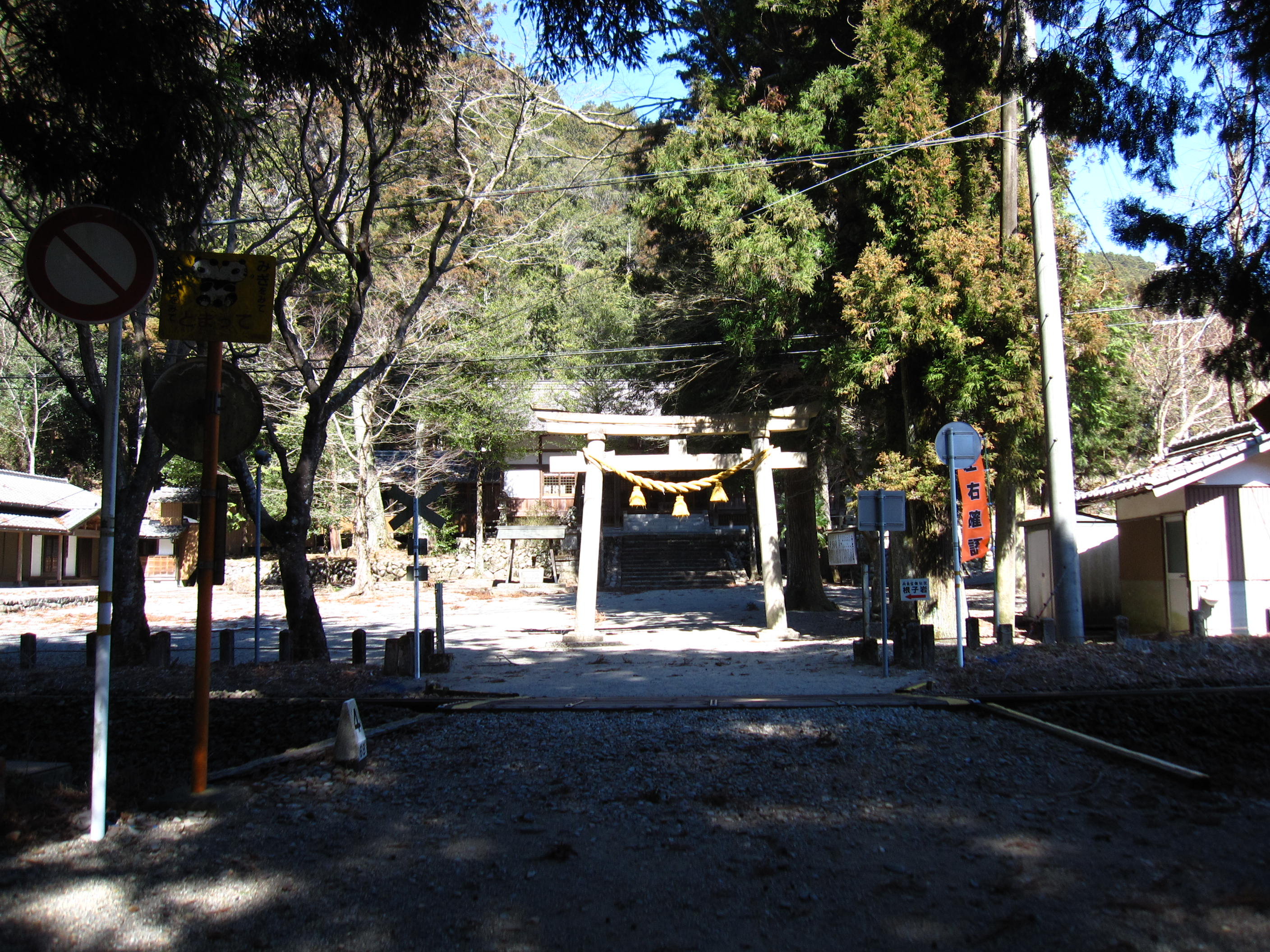 下原八幡神社境内 高山本線踏切